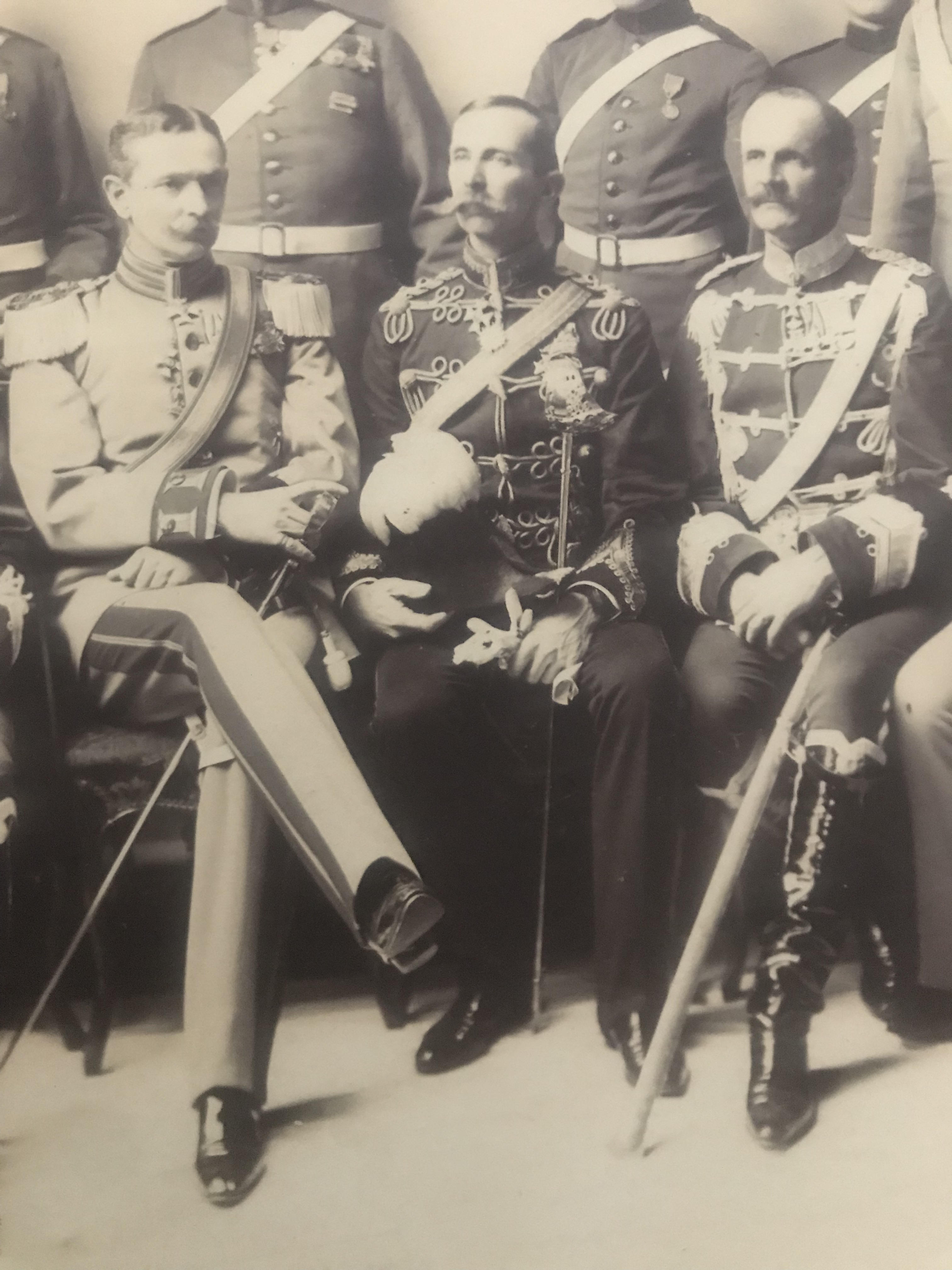 Oberst Friedrich von Rauch (links) als Leiter der preußischen Armeedeputation bei den Beisetzungsfeierlichkeiten für Queen Victoria 1901 ; rechts sein Vetter Nikolaus von Rauch, in der Mitte ein britischer Begleitoffizier